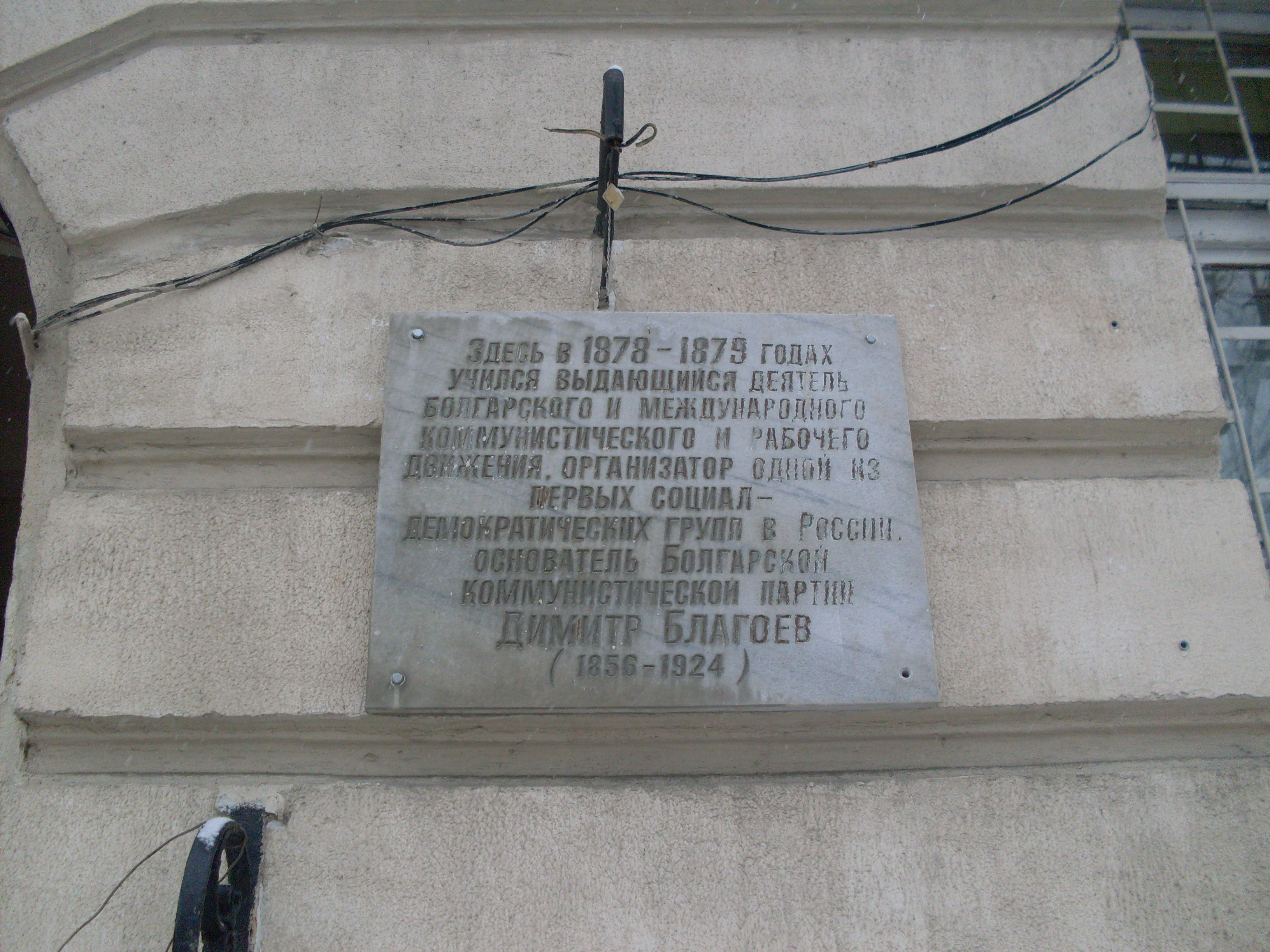 Мемориална плоча на Димитър Благоев на къщата в Одесса, в която той живеял през 1878-1879гг